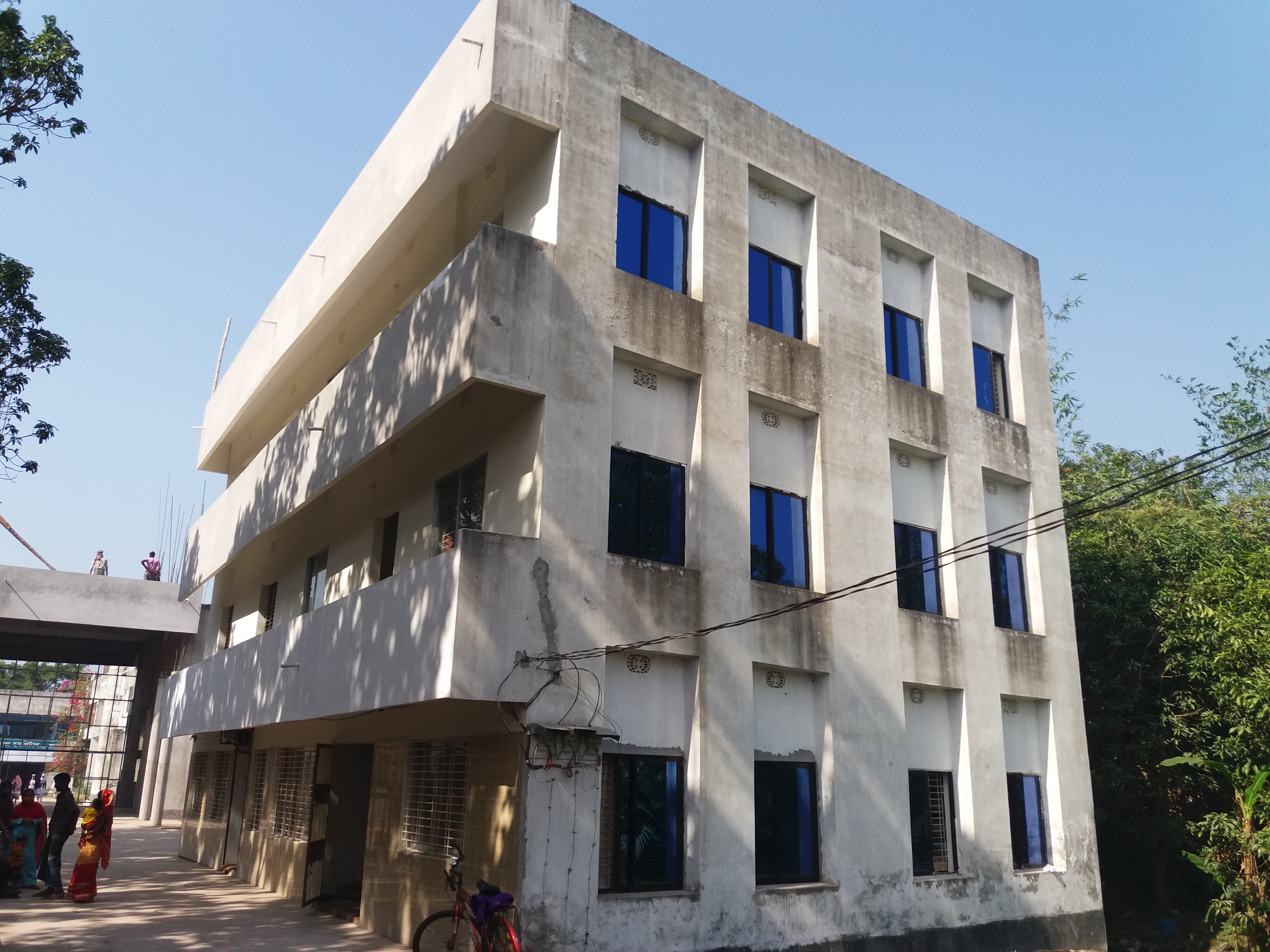 শাহ মখদুম মেডিকেল কলেজ হাসপাতাল